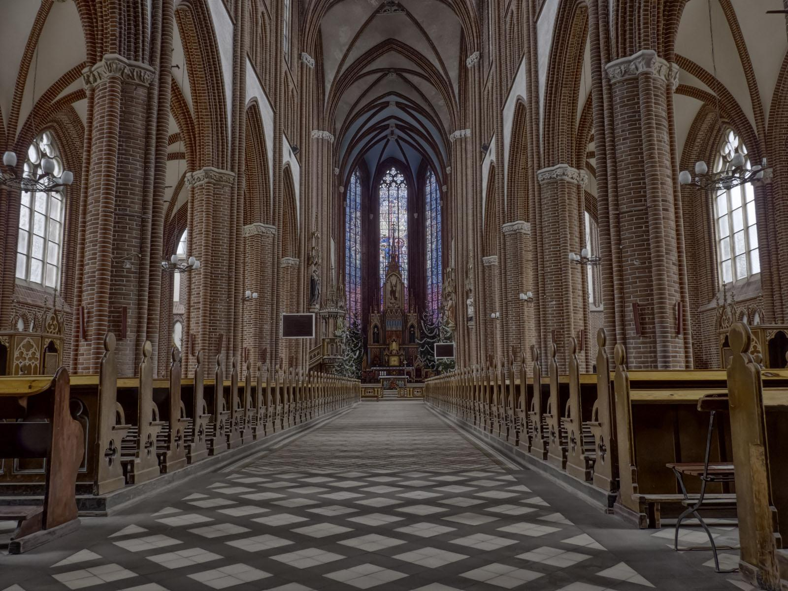 Wrocław - kościół Św. Michała Archanioła - nawa